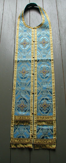 An epitrachelion